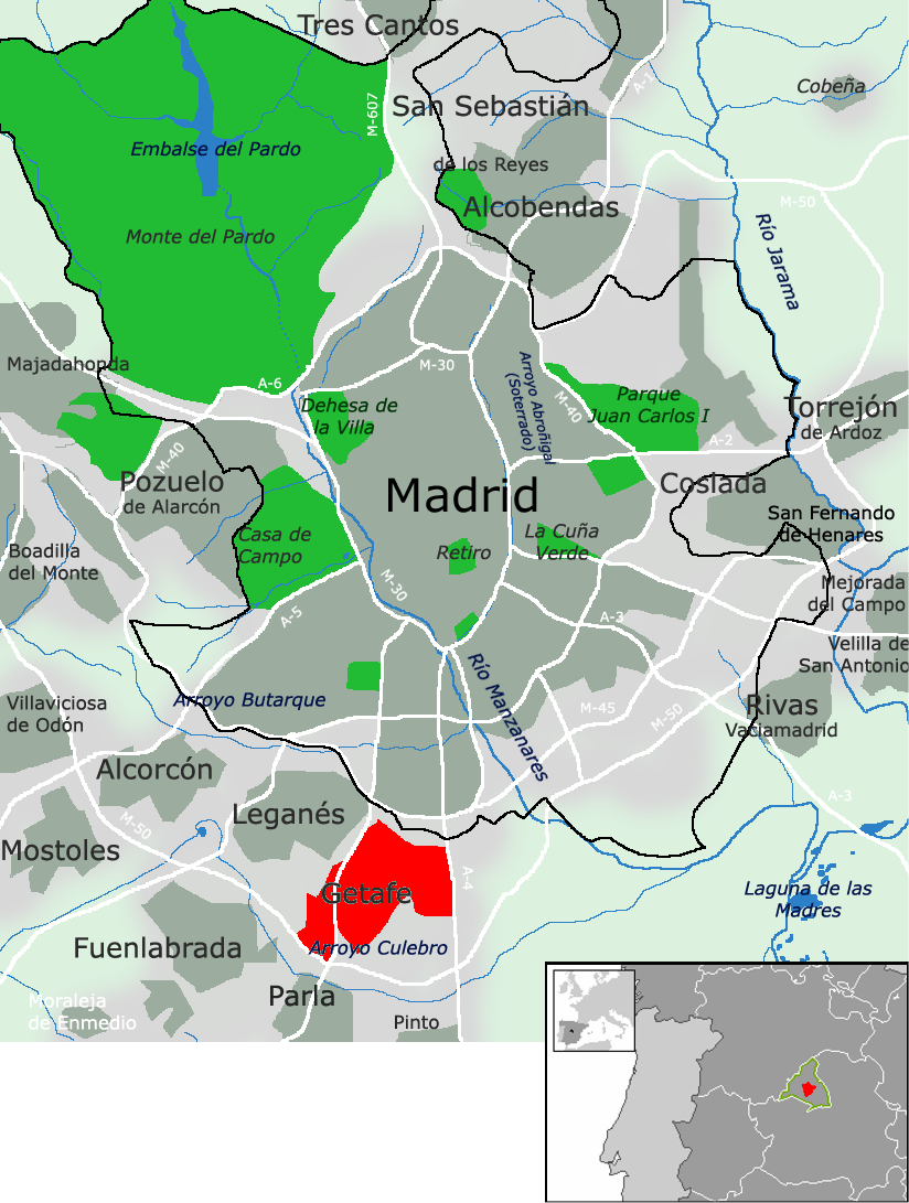 Mapa de Getafe en el área metropolitana de Madrid (España).